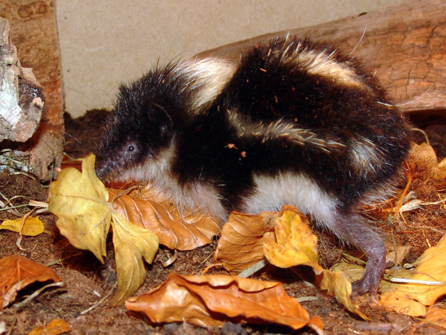 Hemicentetes nigriceps - Hochland-Streifentenrek oder Schwarzkopftenrek